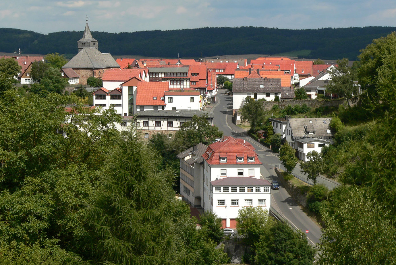 Waldeck, Ansicht vom Schloss Waldeck